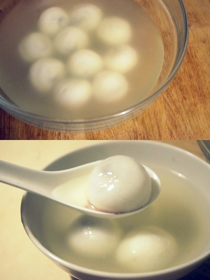 來吃湯圓了 我的寶貝